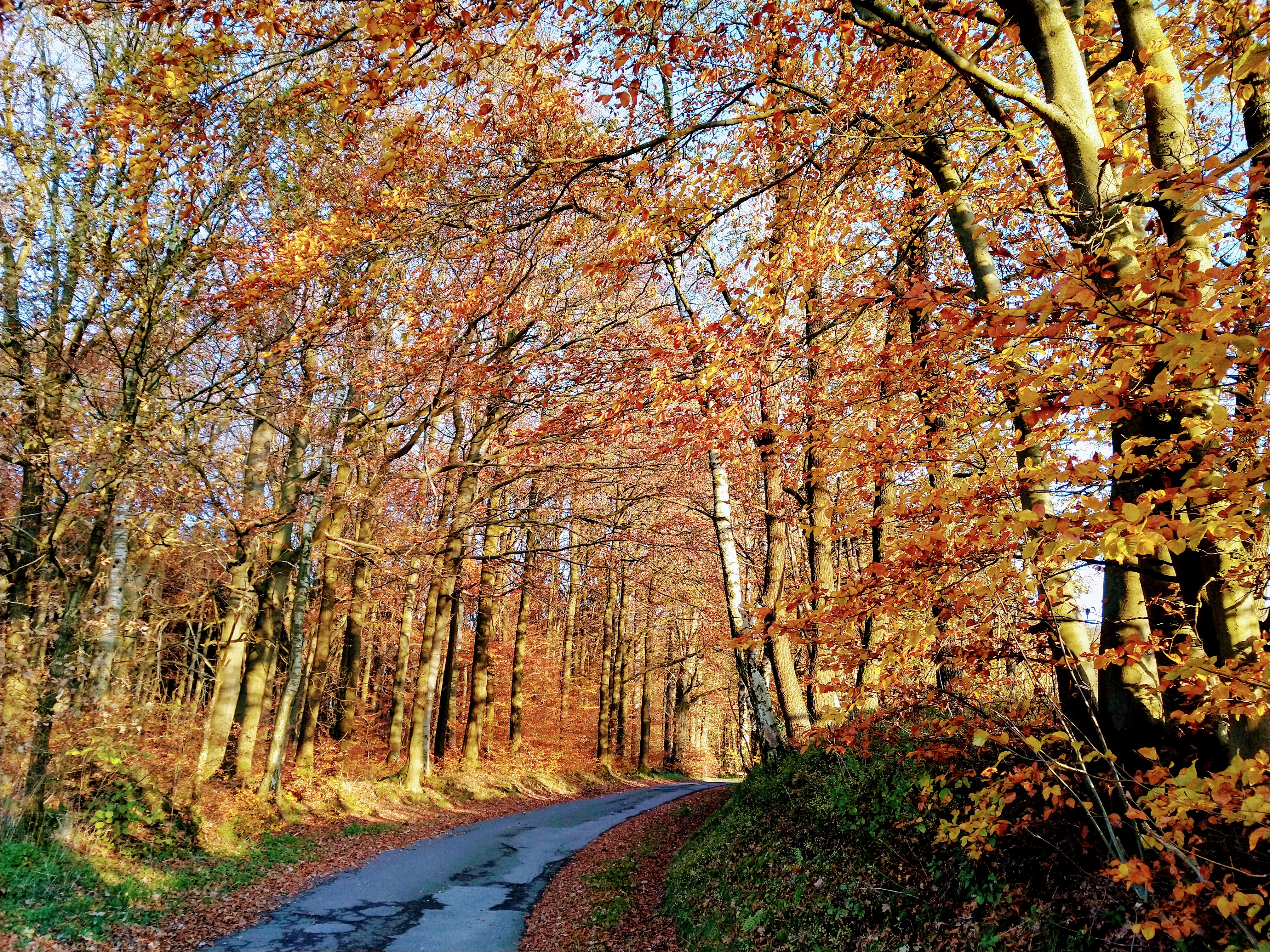 Waldgebiet bei Wildbergerhütte